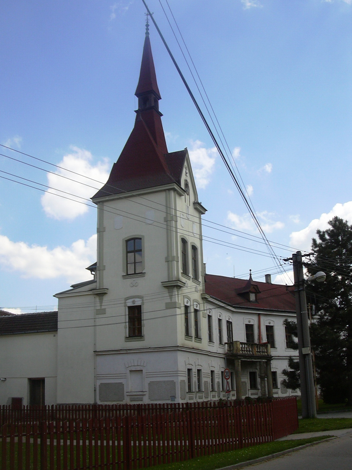 Zámeček Chvalkovice na Hané(Ivanovice na Hané - Czech Republic)